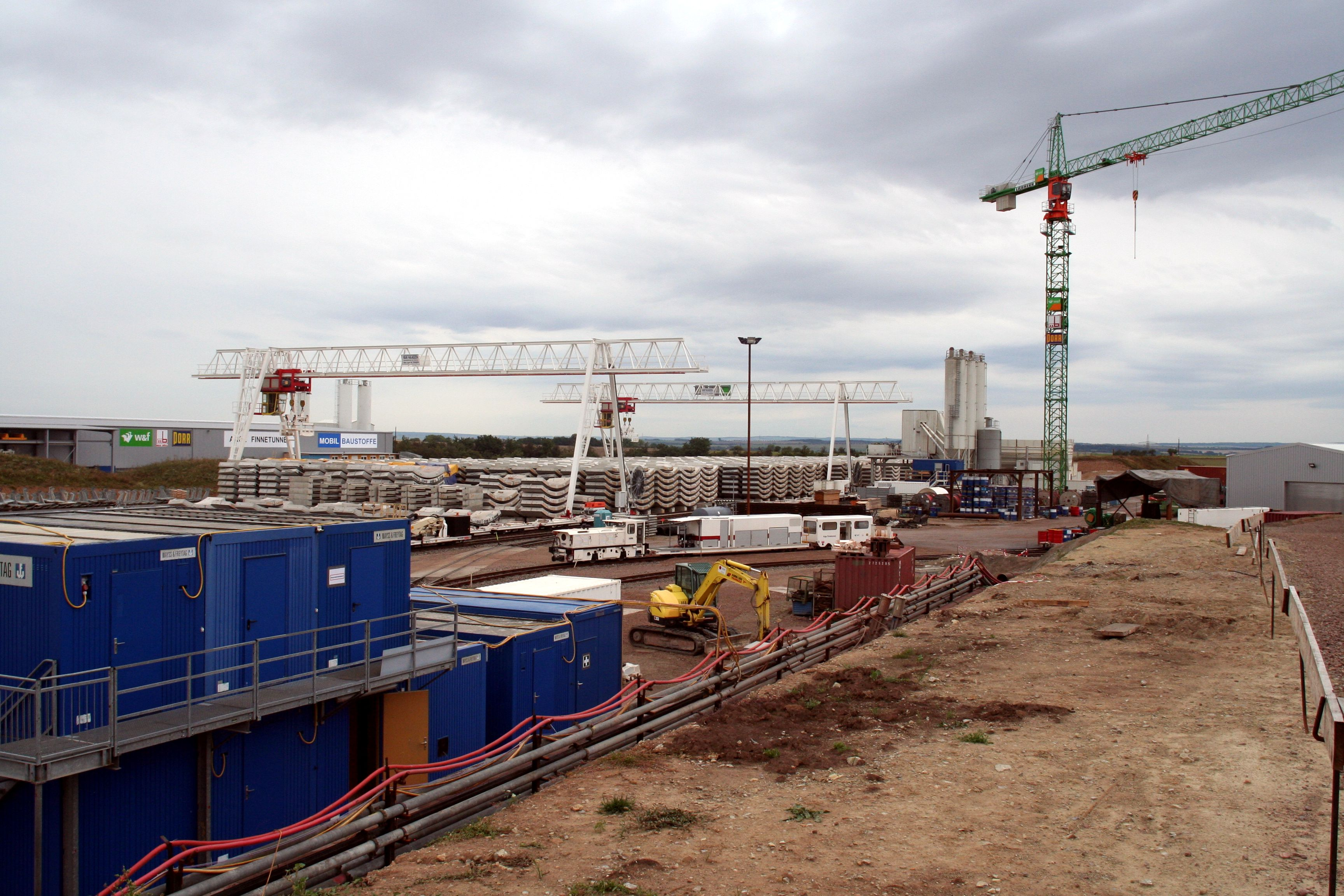 Finnetunnel, Aufbau zweite Tunnelbohrmaschine